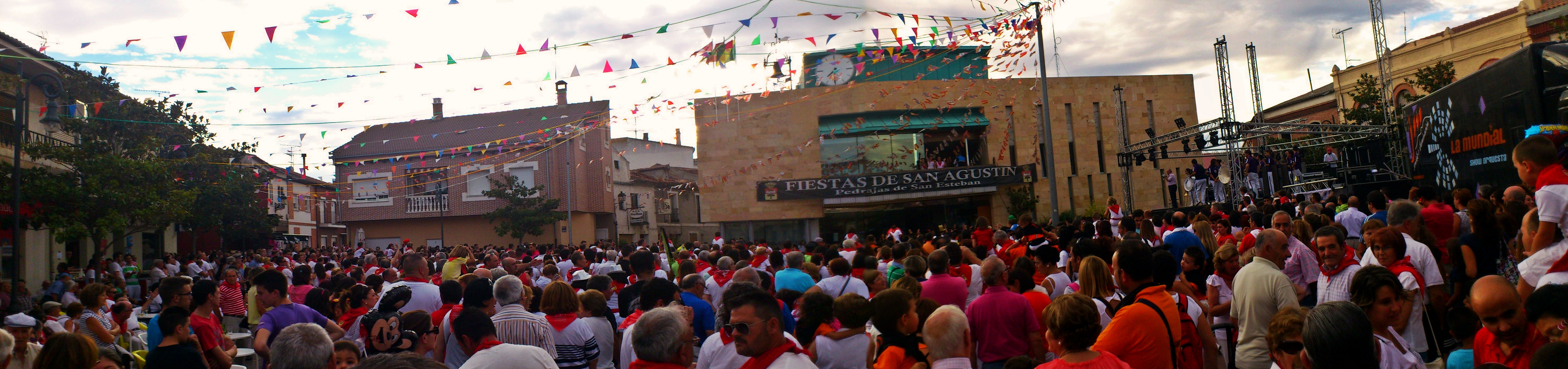 El ¡Agua va! es el chupinazo de las Fiestas de San Agustín de Pedrajas de San Esteban (Valladolid).